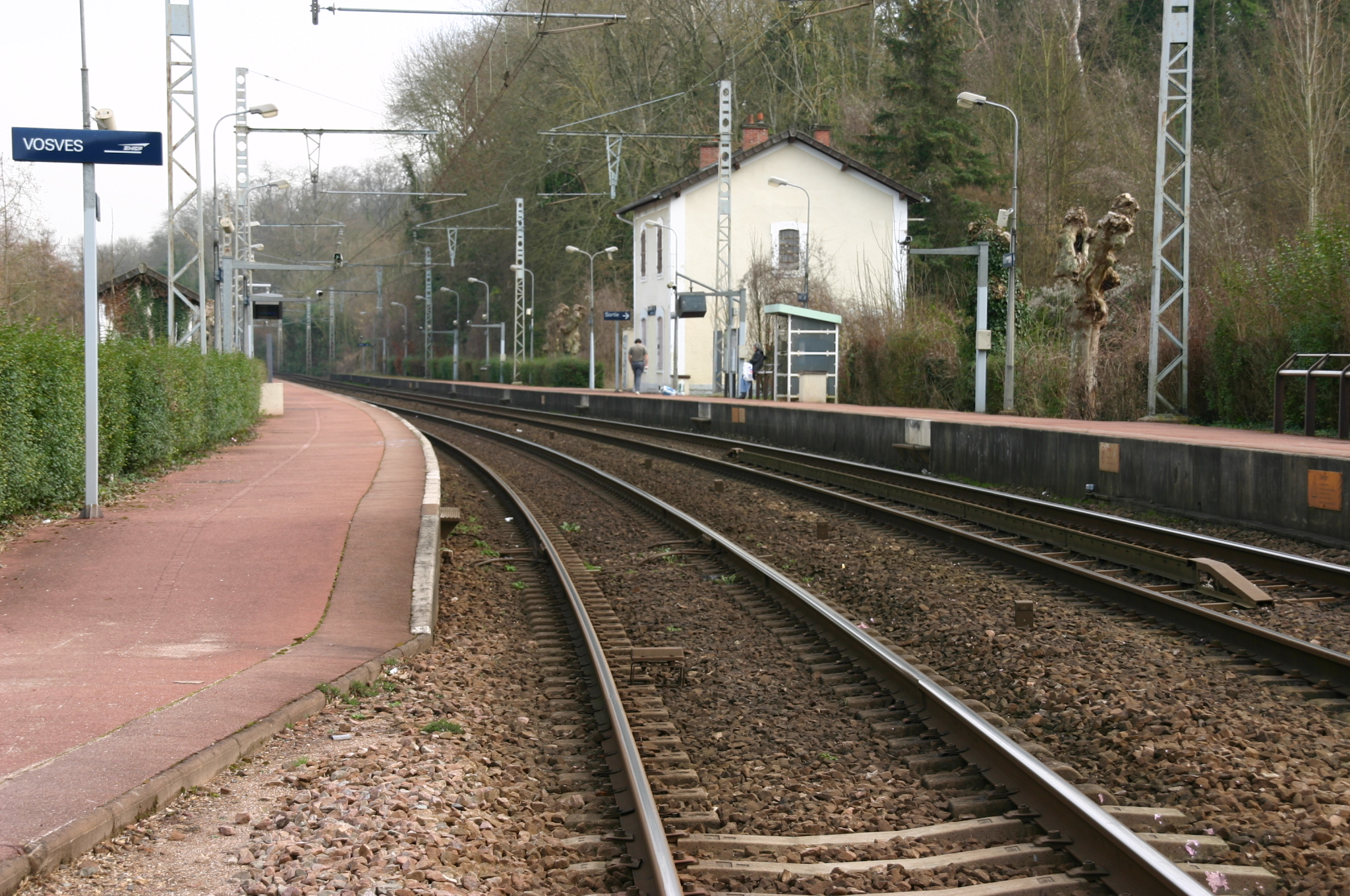 La gare de Vosves, Dammarie-lès-Lys, département de la Seine-et-Marne (France)